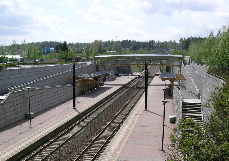 Eidsvoll Verk station, Gardermobanen, Norway.